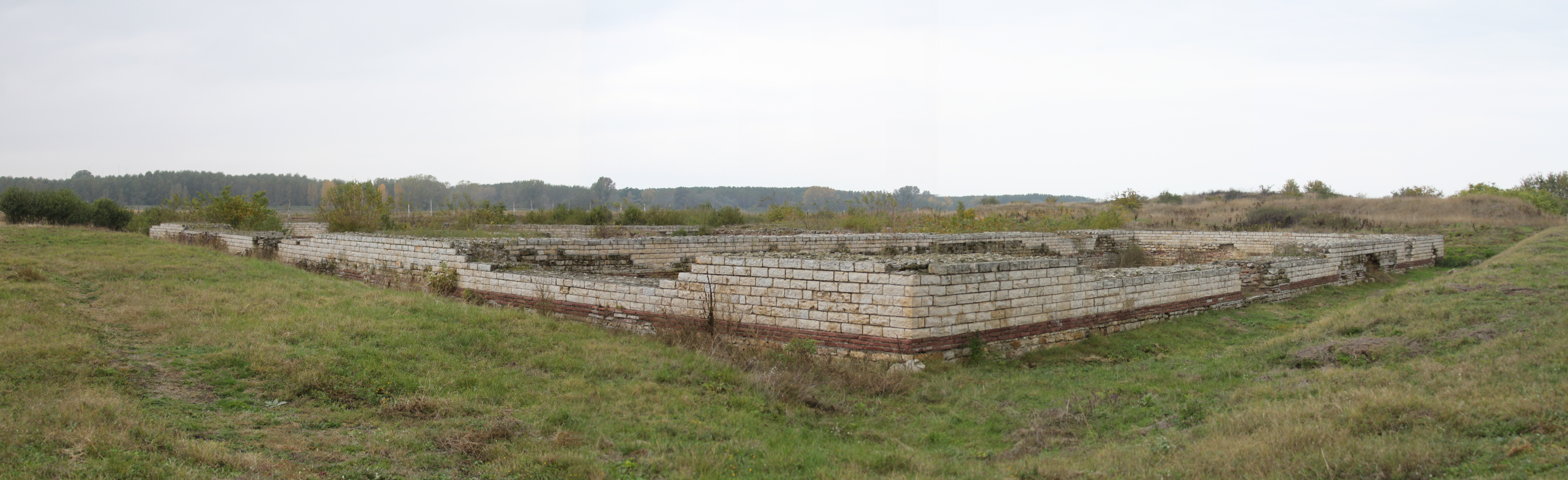 Colonia Ulpia Oescus: lateinisch Ulpia Escus; Nordbulgarien; an der Donau; beim Dorf Gigen; menschenleer; eingezäunt; gepflegte Anlage